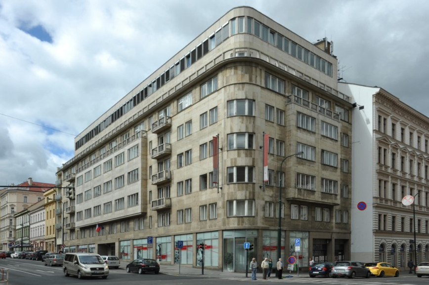 budova CzechInvest ve Štěpánské ulici v Praze